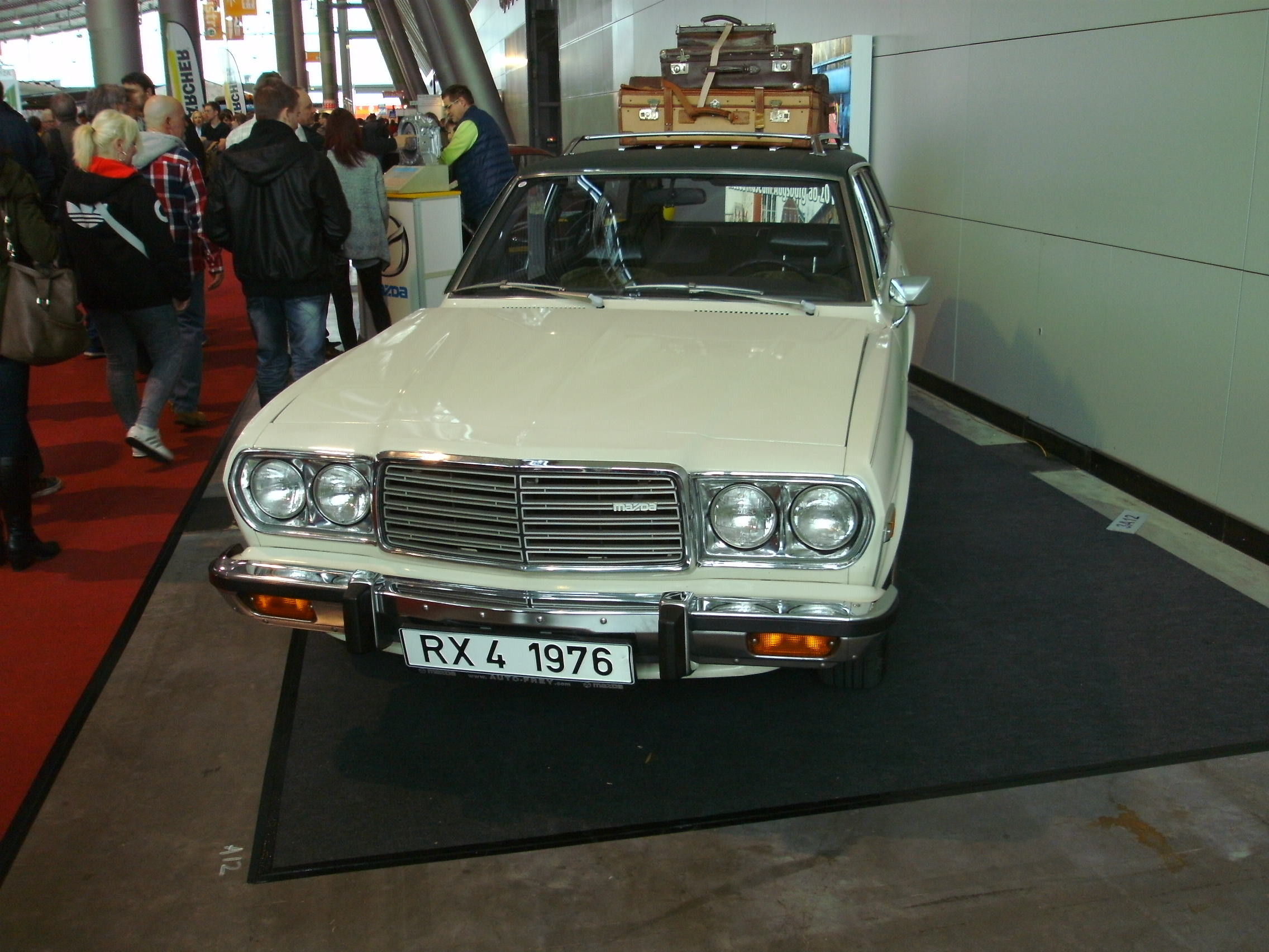 Mazda RX4 Kombi auf Retro Classics Stuttgart 2014